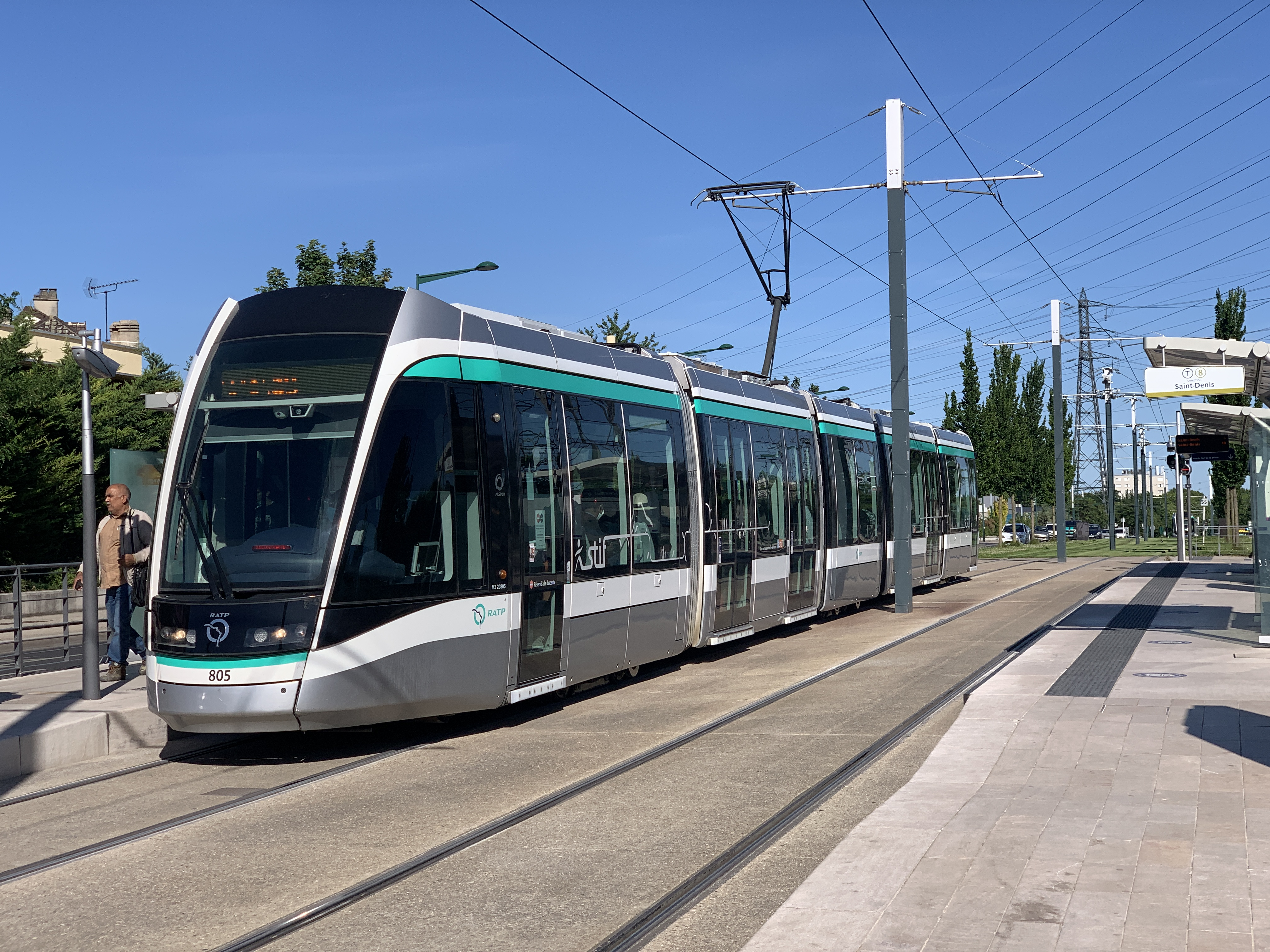 Station de tramway Blumenthal, ligne 8 du tramway d'Île-de-France, Épinay-sur-Seine.